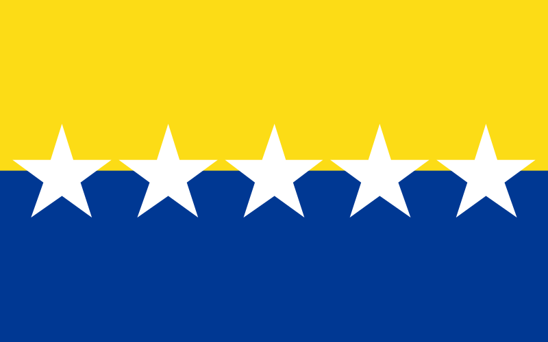 Bandera de Biblián